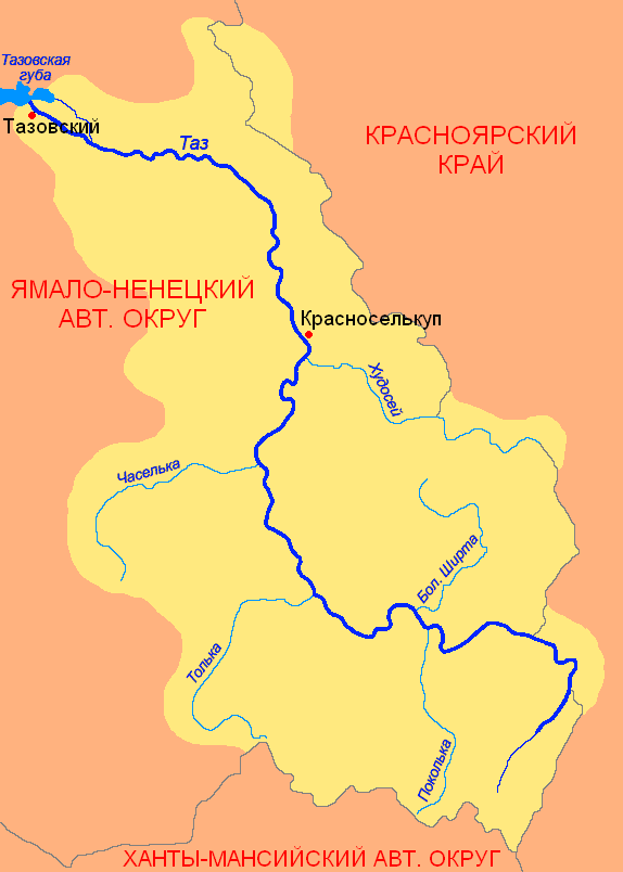 Схема бассейна реки Таз